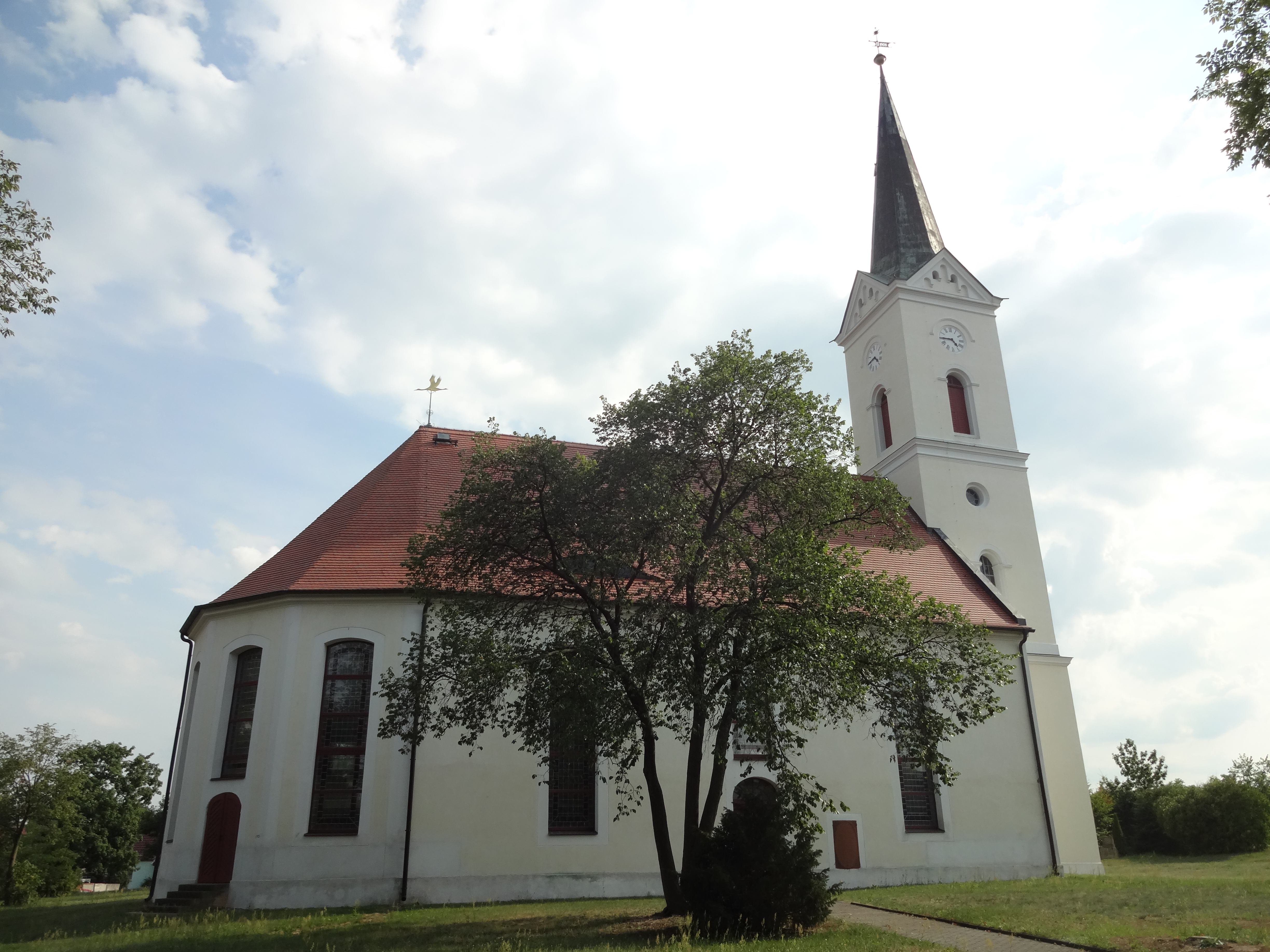 denkmalgeschützte Dorfkirche Zerkwitz